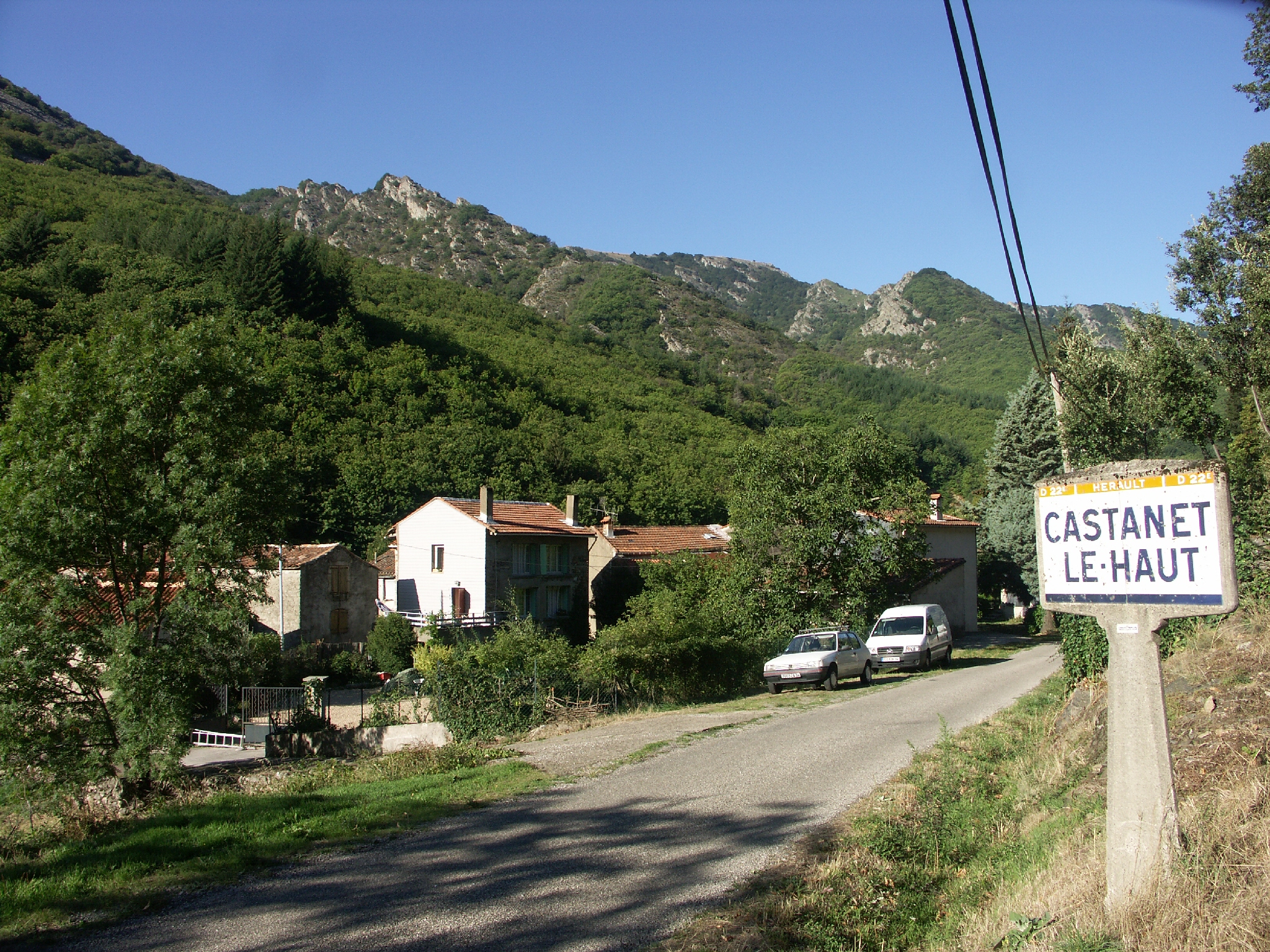 Castanet-le-Haut (Hérault) - Entrée de Castanet-le-Haut en venant de Pabau.